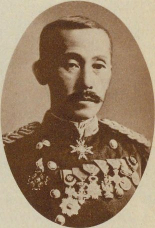 志水直（1849-1927）